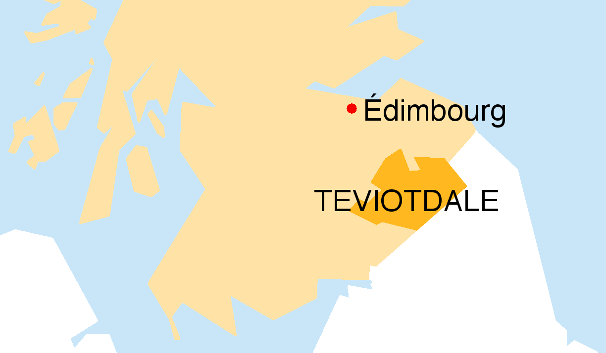 Localisation de l'ancienne province écossaise du Teviotdale. Très schématisé, d'après Map of Scotland within the United Kingdom.svg, de Peeperman, 2012, pour le tracé des côtes ; et d'après Scotland in the Middle Ages; sketches of early Scotch history and social progress (1860) (14763938344).jpg, d'Innes, Cosmo Nelson, 1798-1874, pour le tracé du Teviotdale.